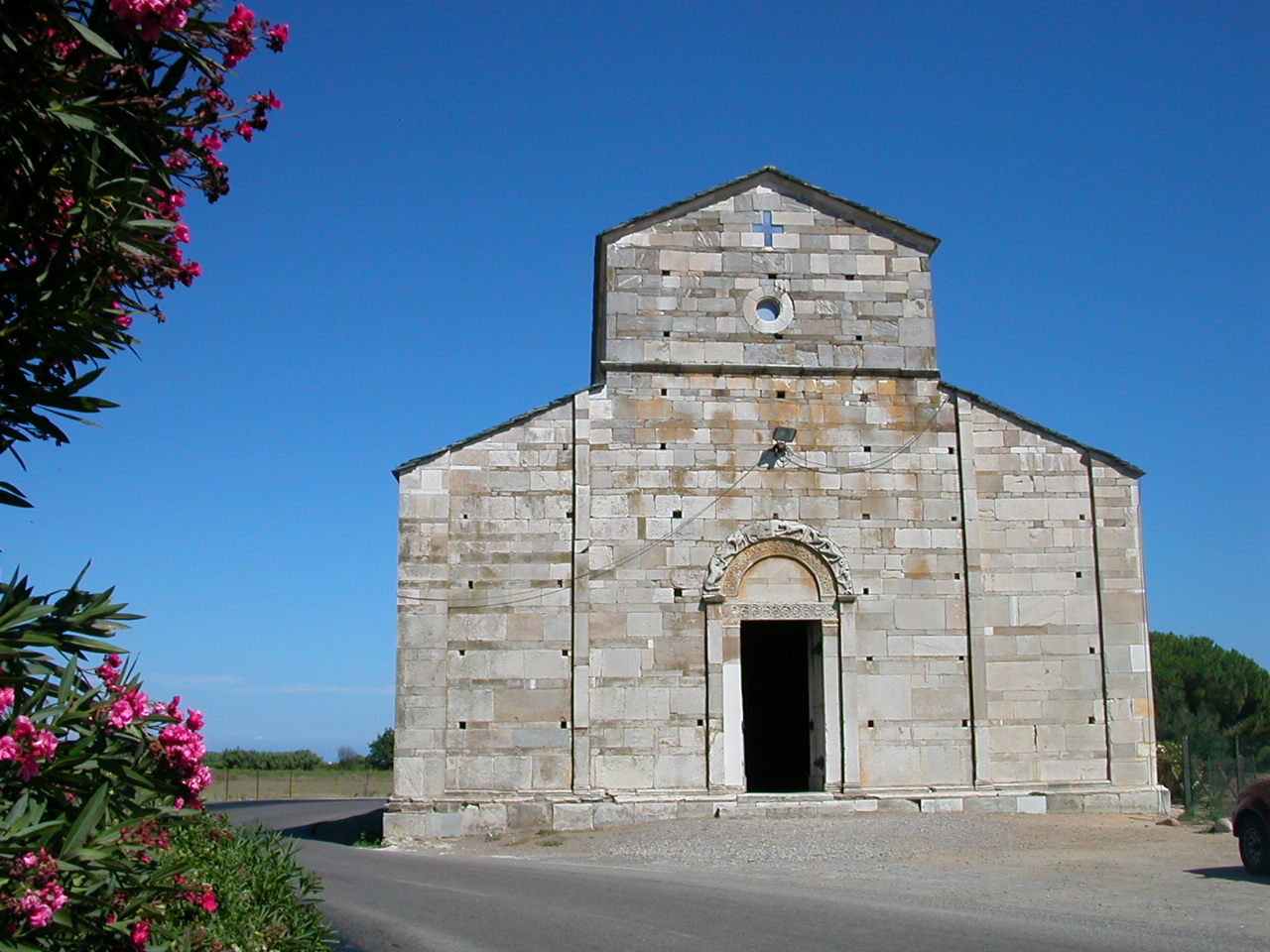 Facade ouest de la cathédrale Sainte-Marie-de-l'Assomption, Lucciana, CorseBrezhoneg: A canonica pe iliz Santez Varia hanter eost, Lucciana, Corsica .